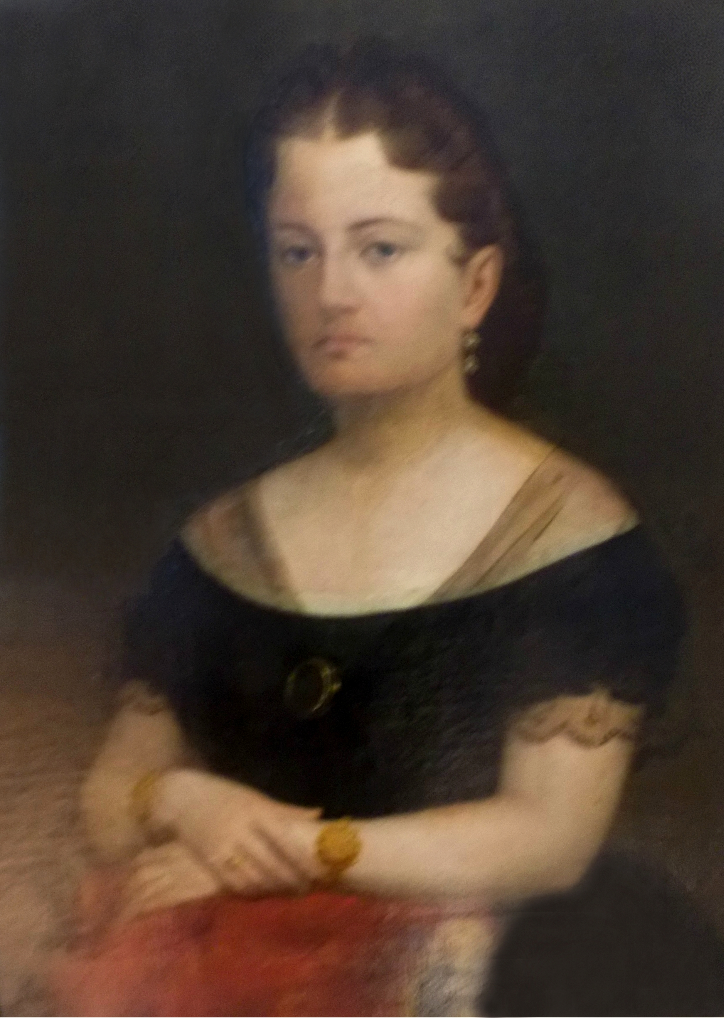 Retrato de María Rosa Carcelén de Guevara y Larrea (Quito, 1811 - ibídem, 1877). Segunda hija que sobrevivió a la infancia de Felipe Carcelén de Guevara y Sánchez de Orellana, VI marqués de Solanda y V de Villarocha. Fue, por tanto, la hermana menor de la última poseedora de aquel título nobiliario, Mariana Carcelén de Guevara y Larrea. Fue, además, cuñada de Antonio José de Sucre, Gran Mariscal de Ayacucho y héroe de la Independencia latinoamericana.